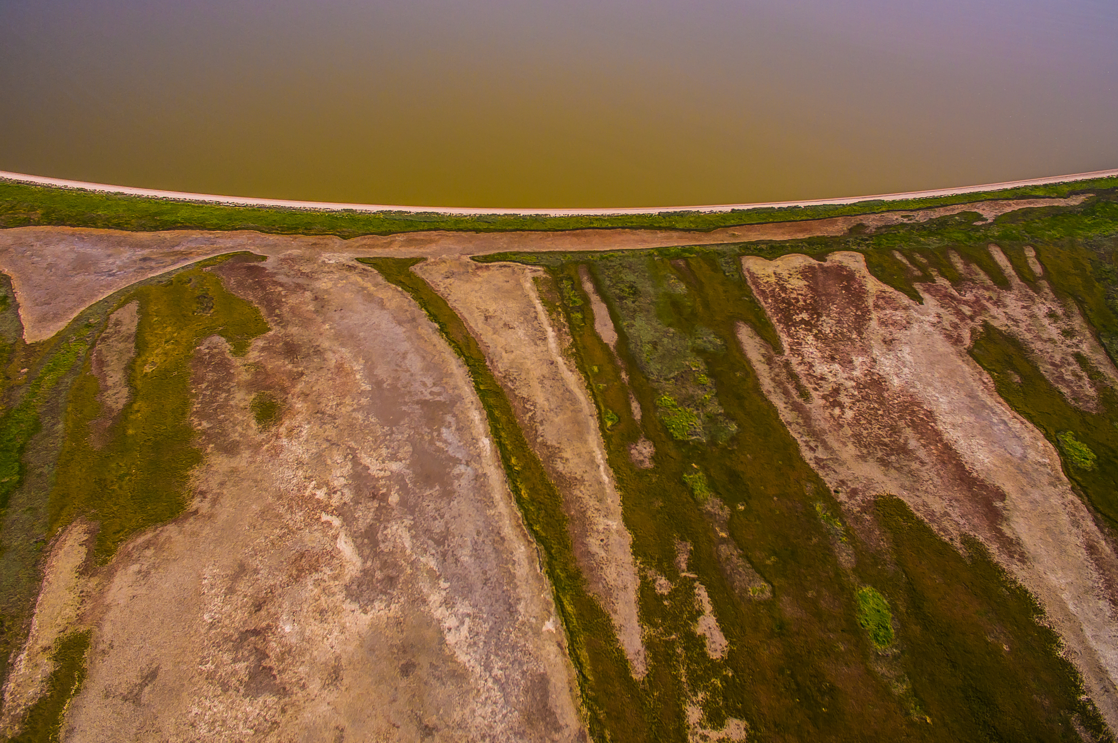 «Приазовський національний природний парк», Бердянський, Мелітопольський, Приазовський райони, міста Бердянськ та Мелітополь